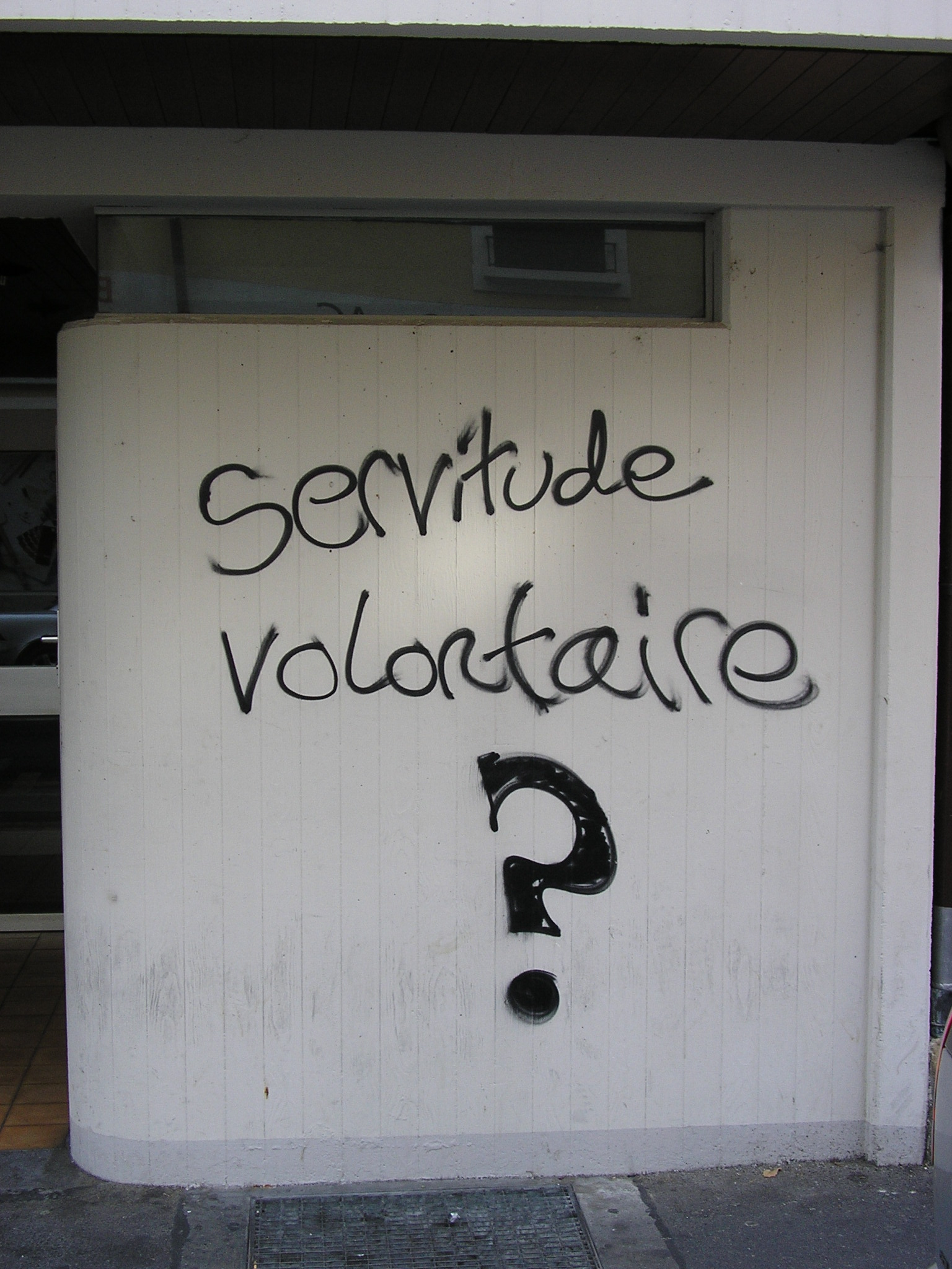 Graffiti à Genève, dans le quartier des Pâquis (rue du Prieuré), dans le cadre du mouvement des squatters et de la crise du logement, 2007